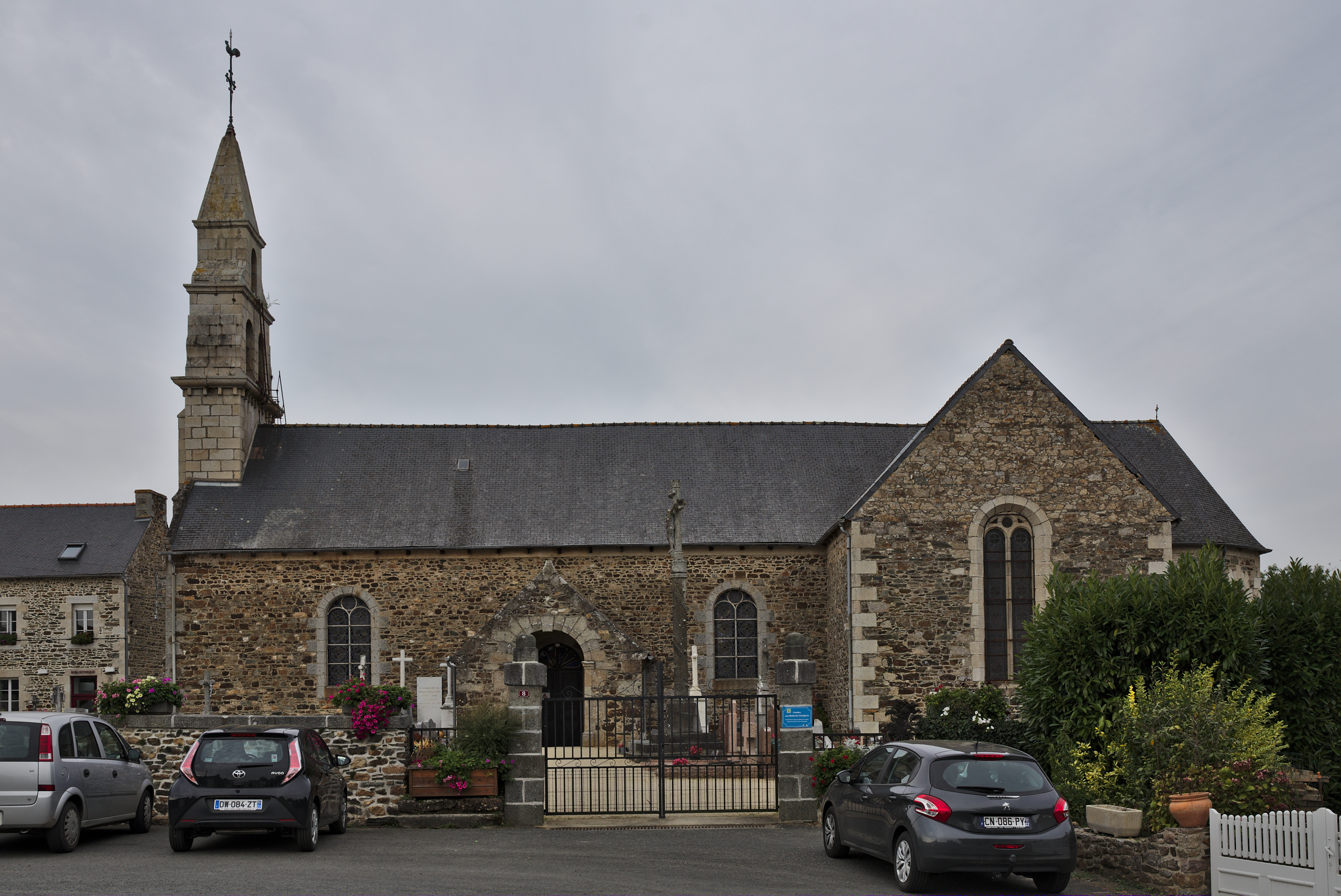 Iliz Tregedel.